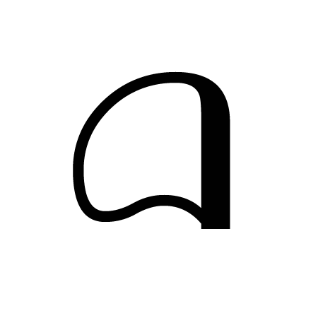 Wulu dalam aksara Jawa.